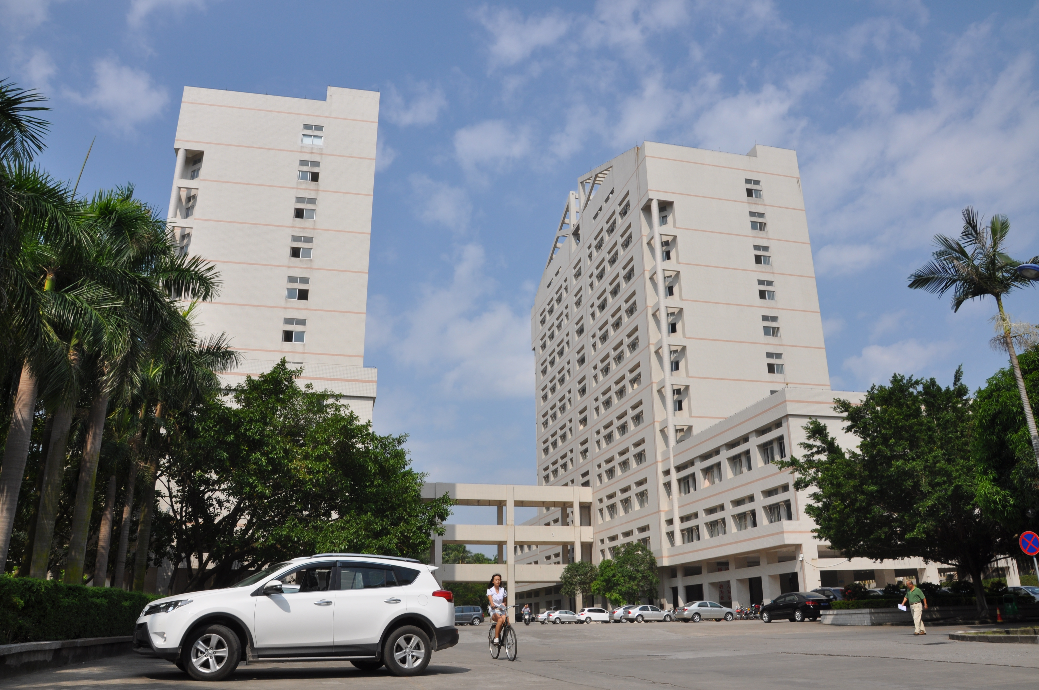 广东石油化工学院 2014-09-liuzusai